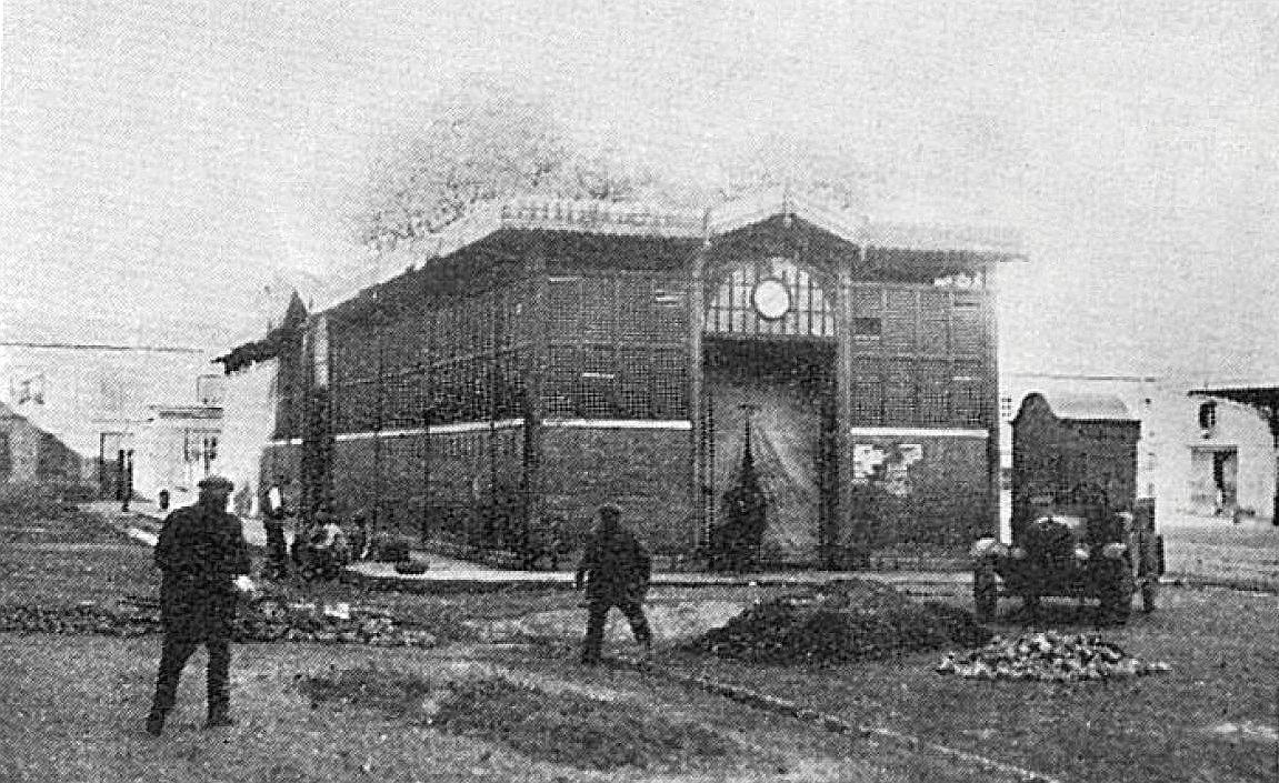 Le marché couvert de Saint-Cyprien à Toulouse.